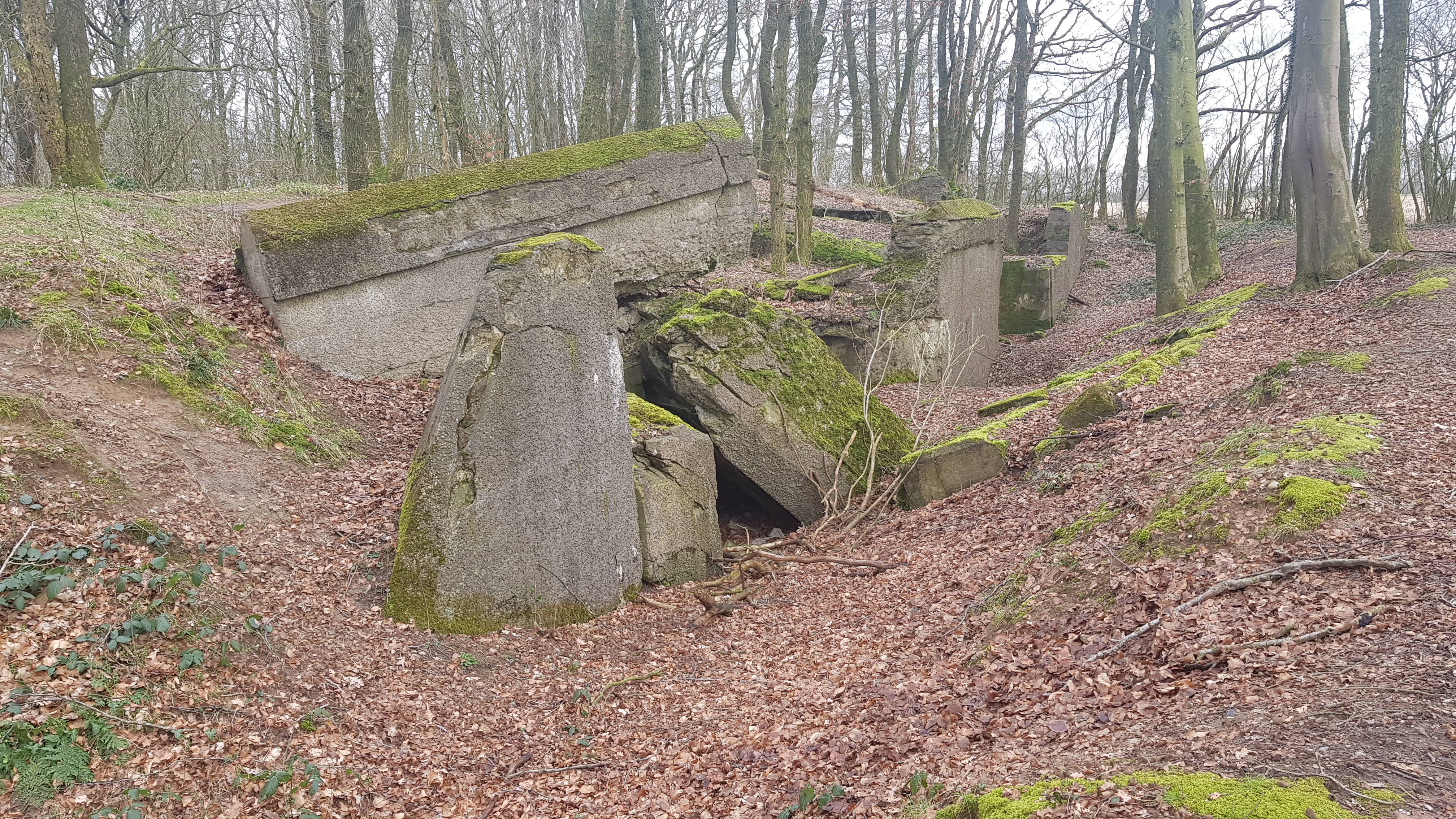 Gammelskov Batteri